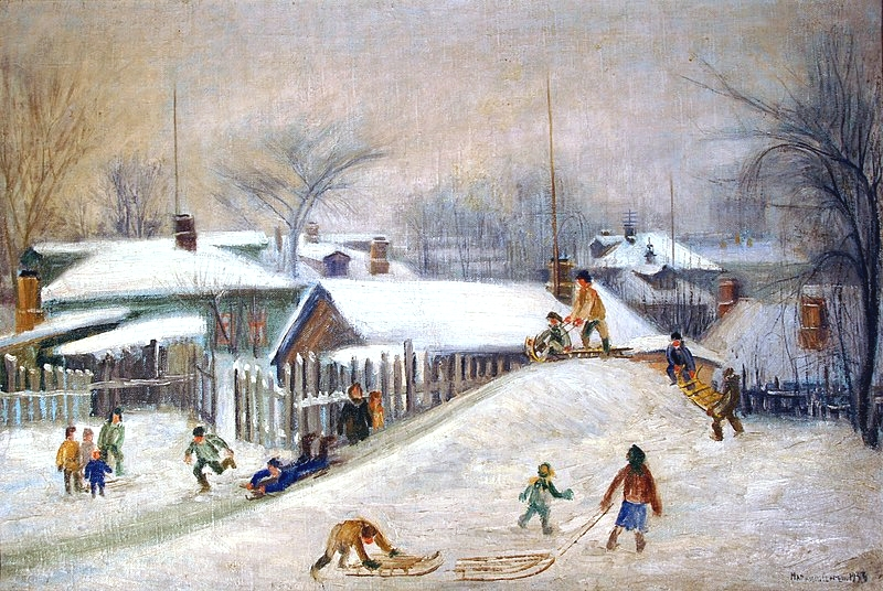 Зимняя горка в московском районе Благуша, 1933 год.